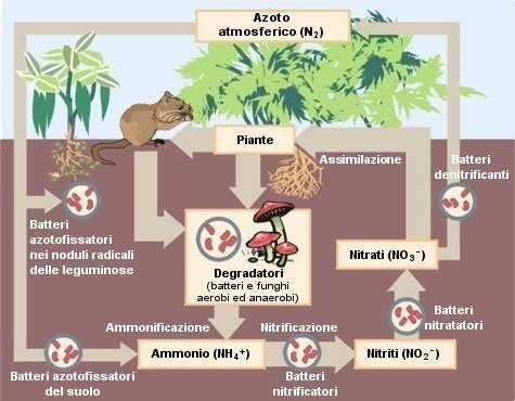 Questa immagine Ã¨ la copia di File:Nitrogen Cycle.jpg, ed Ã¨ stata modificata traducendo le didascalie in italiano.